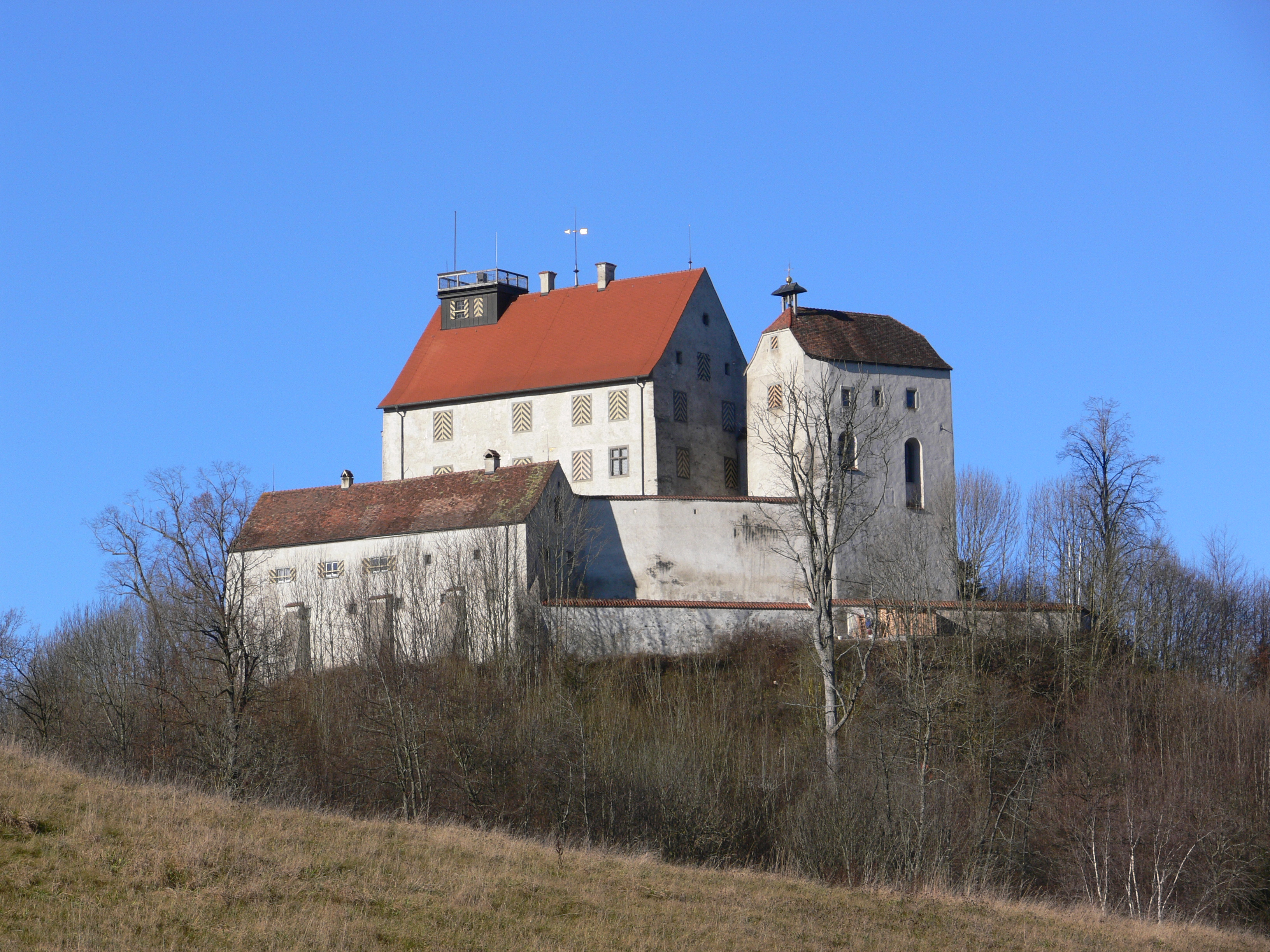 Die Waldburg in Waldburg, Landkreis Ravensburg (fotografiert vom Parkplatz der Grund- und Hauptschule aus)